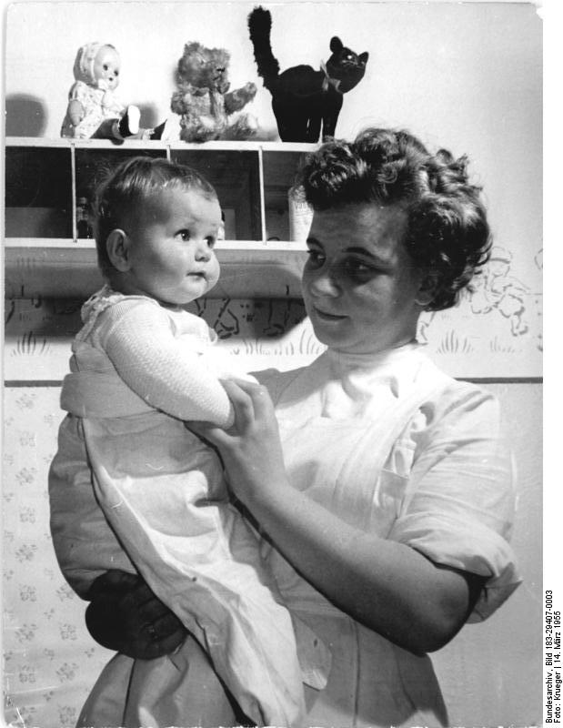 LPG Wortenberg, Blick in die Kinderkrippe Zentralbild Krueger 14.3.1955 Berliner LPG eröffnete Kinderkrippe In der LPG "1.Mai" in Berlin Wortenberg wurde am Vortag des Internationalen Frauentages eine Kinderkrippe mit 20 Plätzen ihrer Bestimmung übergeben. Am 14. März sind die ersten Kleinstkinder in die neue Kinderkrippe aufgenommen worden. UBz: Säuglingspflegerin Ingrid hat sich mit der kleinen Jutta Döhring gut angefreundet, deren Mutti in der Gärtnerei der LPG arbeitet.